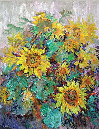 Картина Л.Чернова